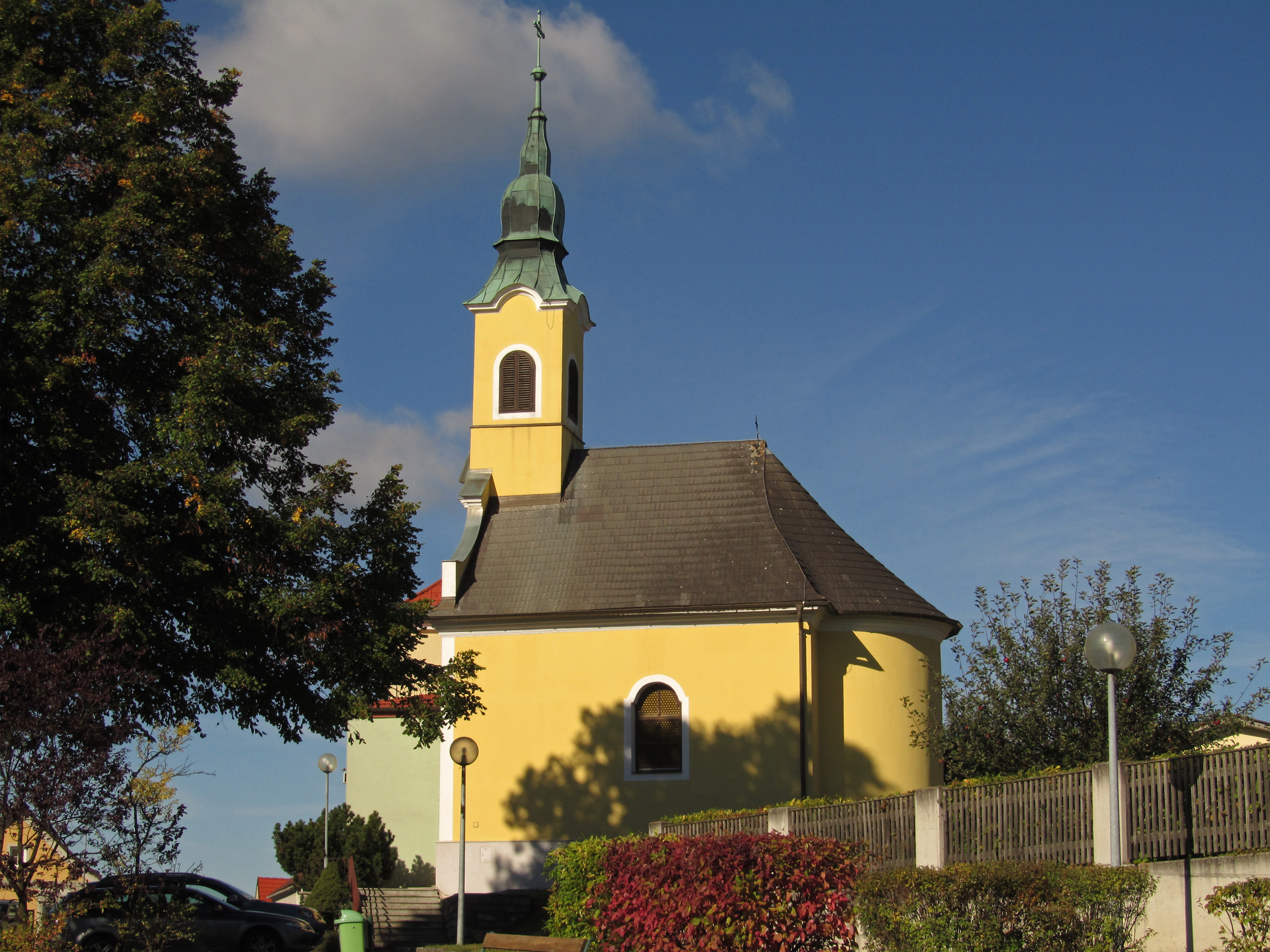 Die Ortskapelle in Alt-Dietmanns wurde auf der Kuppe am Platz im Jahr 1801 errichtet. Der nachbarocke Bau mit gefaschten Rundbogenfenstern und eingezogener Halbkreisapsis, durch Gesims zusammengefasst, hat zwischen den Giebelanschwüngen einen von Dreiecksgiebel überblendeten Fassadenturm unter Glockenhelm.